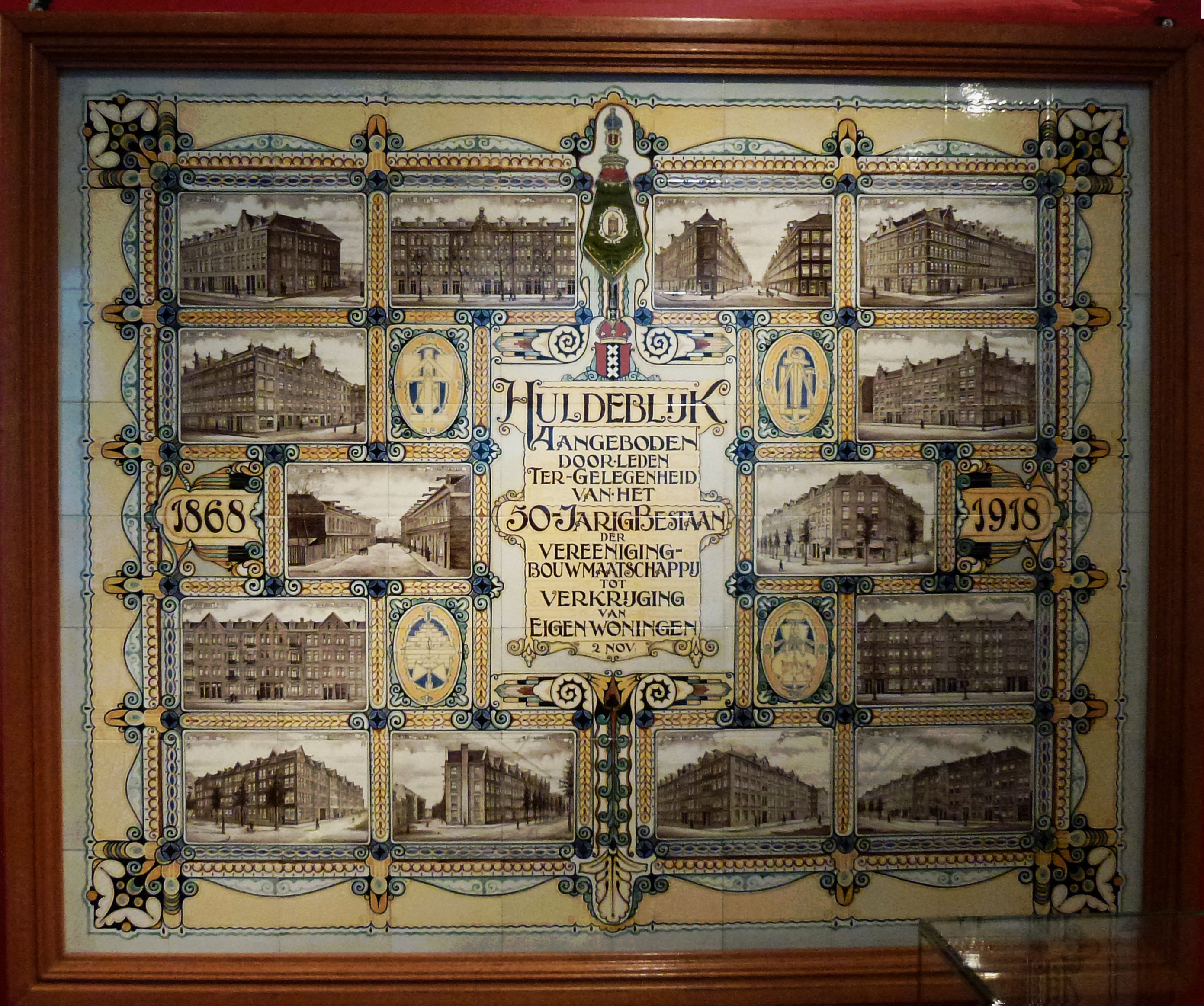 Tegeltableau Woonstichting de Key uit 1918 vervaardig door Plateelbakkerij Delft N.V. ter gelegenheid van het vijftigjarig bestaan van Vereeniging Bouw maatschappij tot Verkrijging van Eigen Woningen. Tot 1903 realiseerde deze maatschappij 780 woningen. In 1983 werd het opgenomen in Woningbouw vereniging Onze Woning en in 1997 in Woonstichting De Key. Rechts onder aan het tableau staat: PB Delft, Hilversum